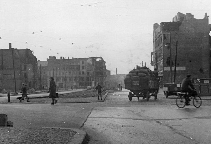 ADN-ZB Funck Berlin 1949: Die Große Frankfurter Straße (Heute Karl-Marx-Allee). Blick von der Kreuzung Andreasstraße in Richtung Alexanderplatz. 4248-49 29.10.1949